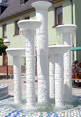 Porzellanbrunnen in der Selber Fußgängerzone Fotograf: Walter J. Pilsak, Waldsassen 2003 Copyright Status: GNU Freie Dokumentationslizenz